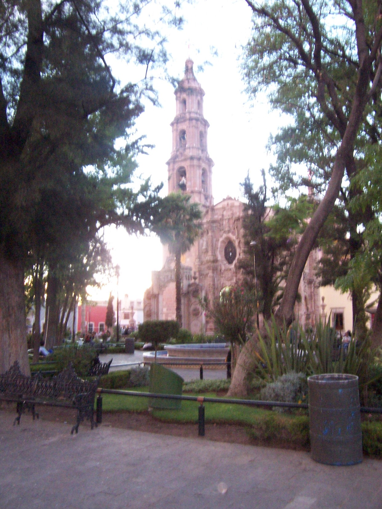 Jardín del encino